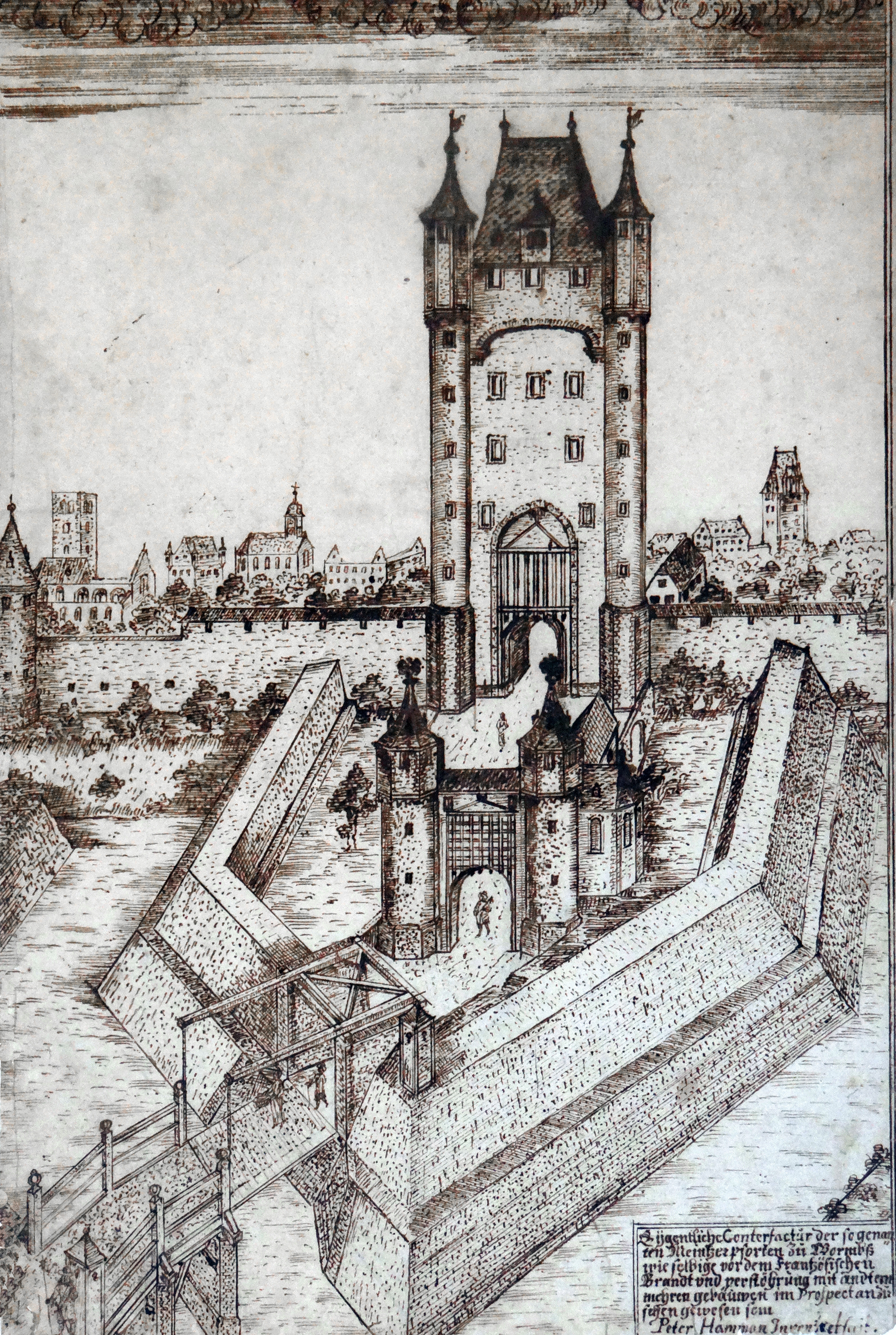 Mainzer Tor, Worms. Zeichnung von Peter Hamman. Stadtarchiv Worms, Abt. 1B, Nr. 48